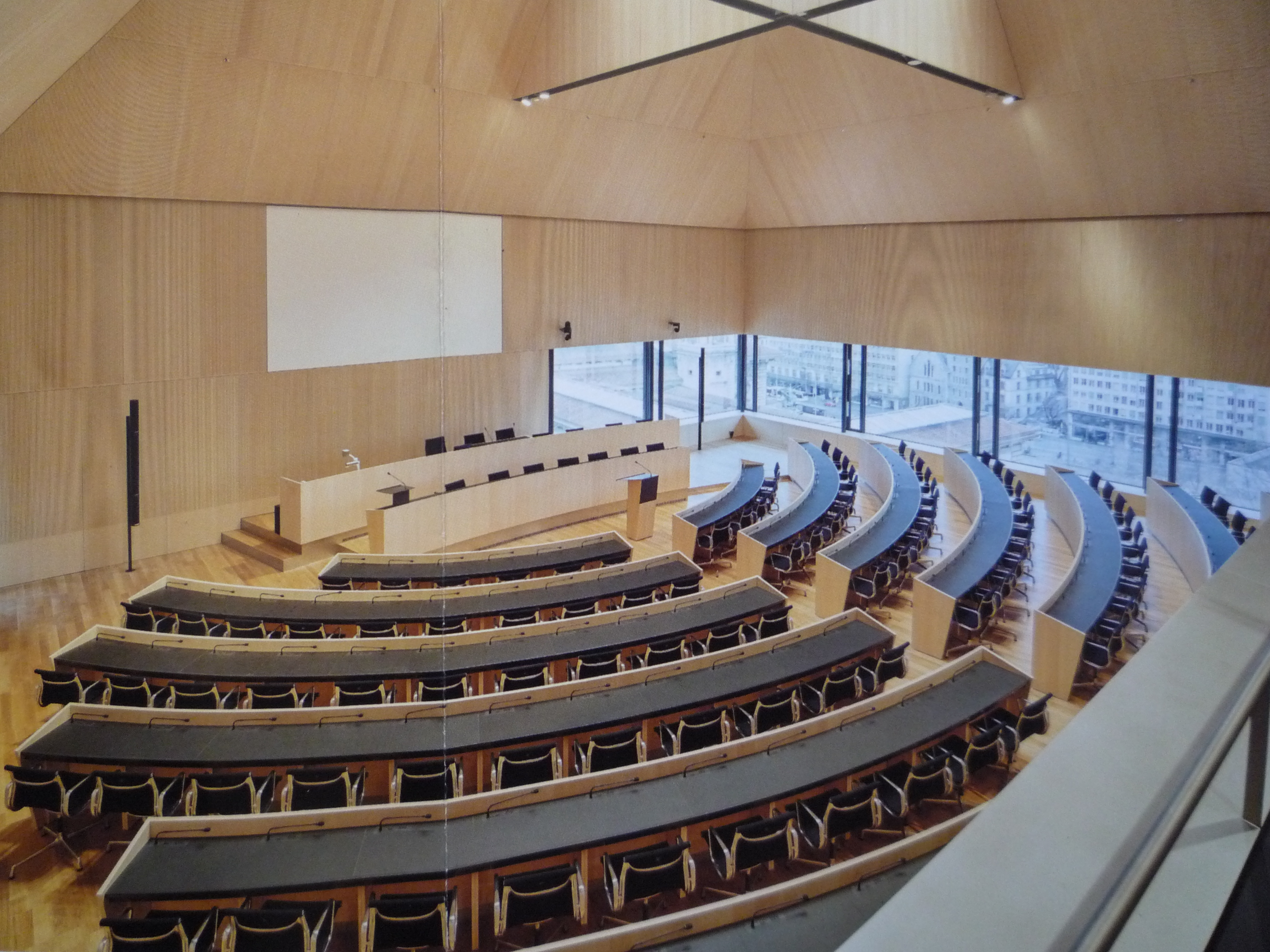 Photo de la photo de la Salle du Grand Conseil du Canton de Vaud, figurant sur le programme d'inauguration du nouveau parlement vaudois, après reconstruction, édité et distribué au public pour le 14 avril 2017.